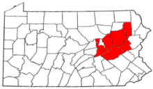 Molly Maguiresak aktibo egon ziren zonaldeak Estatu Batuetan.